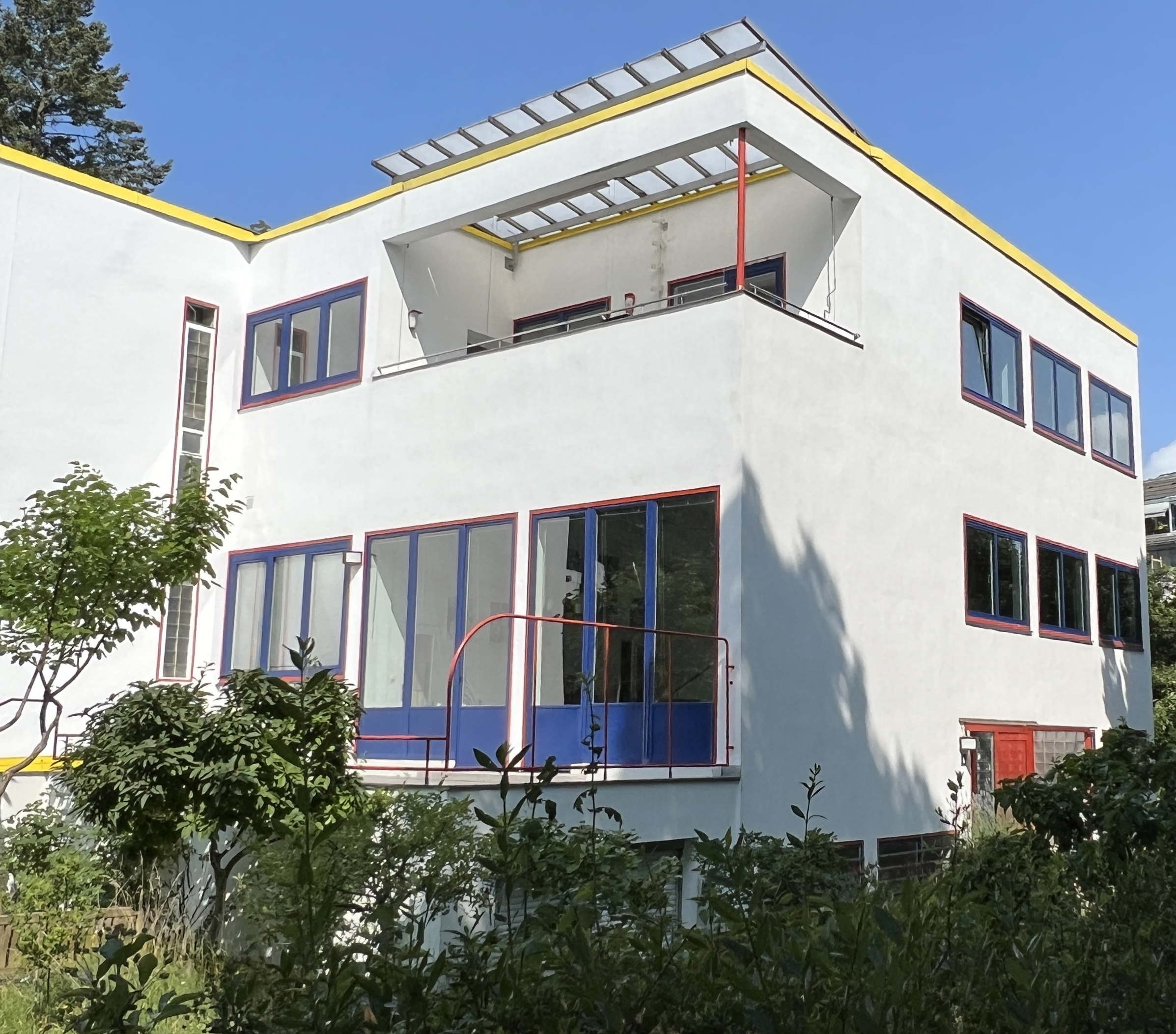 Doppelwohnhaus "Fritz Lang - Thea von Harbou", Schorlemerallee 7/7a, 14195 Berlin-Dahlem Stahlskelettbau im Stil der "Neuen Sachlichkeit" (sog. "Bauhaus-Stil"), Fertigstellung 1929. hier: die Nr. 7 (heute Anschrift Spilstr.9) des Bauabschnitts 2 der Versuchssiedlung Schorlemerallee. Bitte den aktuellen Bauzustand vom 11.8.2020 beachten. Versuchsiedlung Schorlemerallee: Baubschnitt 1, in traditionellem Mauerwerk: zwei Baublöcke mit je sechs Reihenhäusern in doppelt gestaffelter Anordnung (Nr. 13, 13A, 15, 15A, 17, 17A sowie 19, 19A, 21, 21A, 23, 23A) Baubschnitt 2, in patentiertem Stahlskelett: das Atelierhaus (Nr.17B) der Architekten, das abgebildete Doppelhaus (Nr. 7/7a -die Nr.7 heute Spilstr.9-) sowie zwei frei stehende Häuser (Nr. 9 und 11). Baubschnitt 3, in modernem Stahlbeton: Baublock mit vier Reihenhäusern (Nr.12, 12A, 12B, 12C)